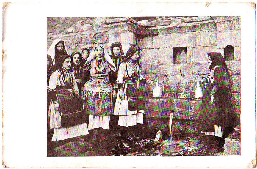 Завеждане на булка на чешмата Упия. Село Галичник. Пощенска картичка от началото на 20 век (между 1903 и 1908 година).